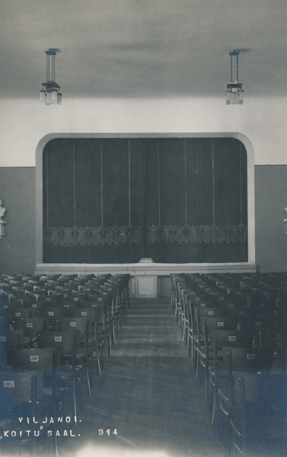 Koidu seltsi maja saal, Viljandi, 1932